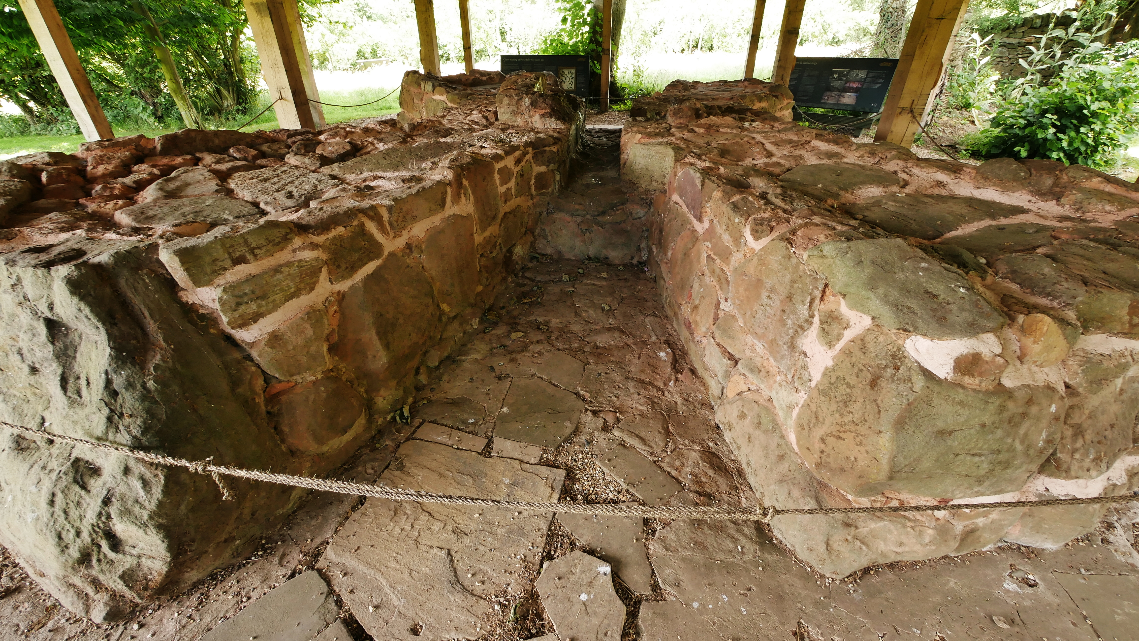 Ryedale Folk Museum - Glass furnace